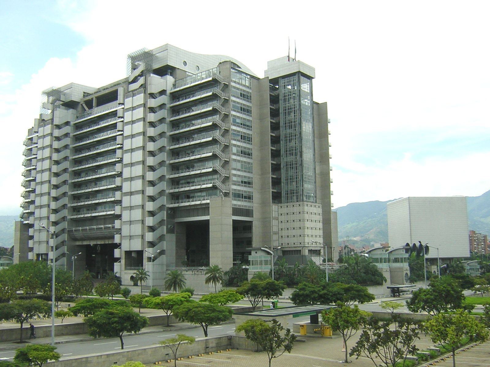 Edificio Empresas Publicas de Medellín, mas conocido como edificio inteligente, Medellín, Colombia